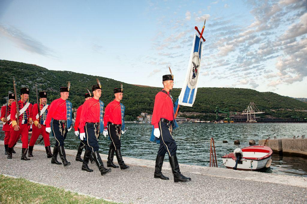 Počasna sokolska garda Osijek, mimohod povijesnih postrojbi HV u Bakru